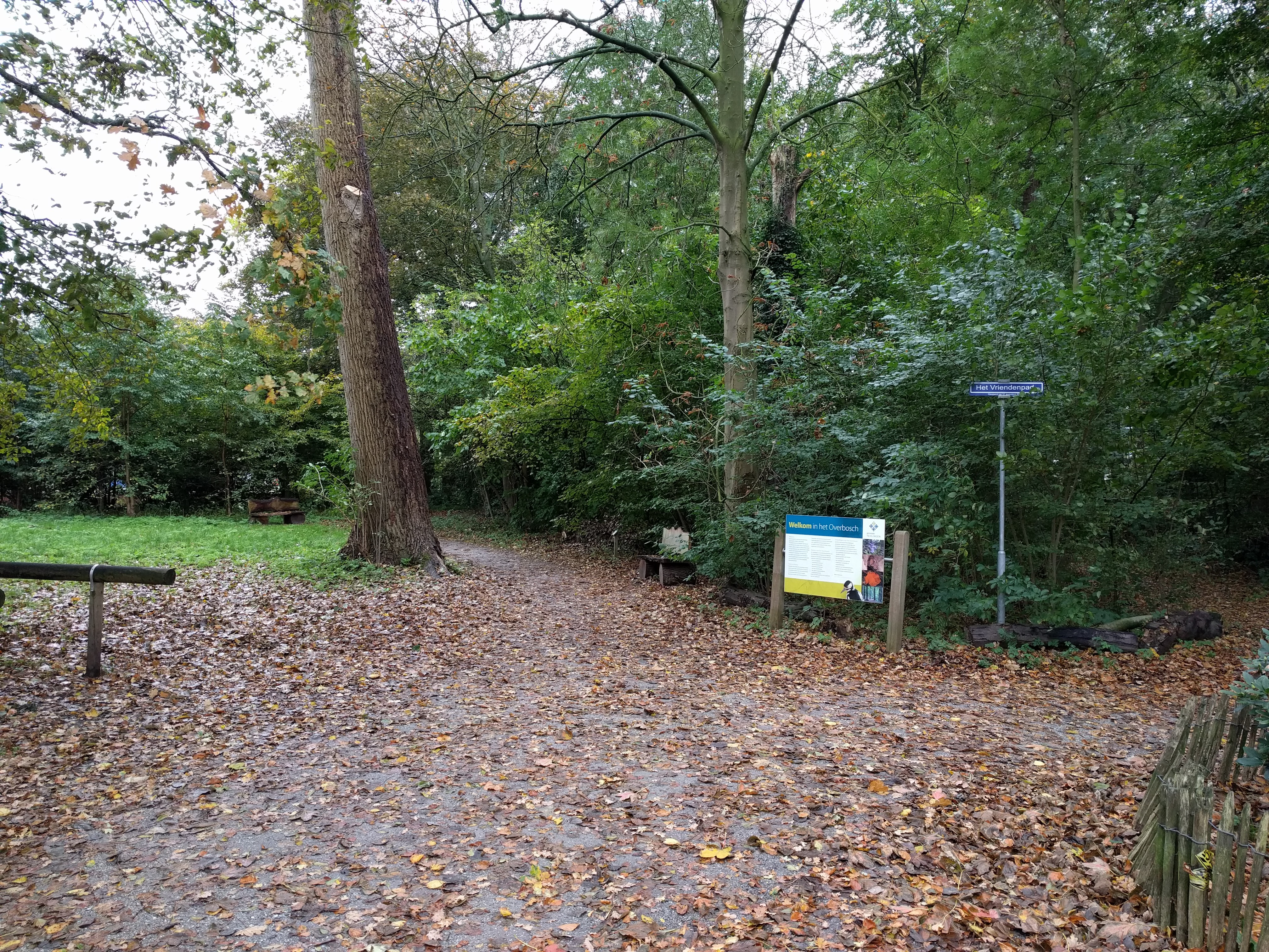 Voorhout - Overbosch - Ingang